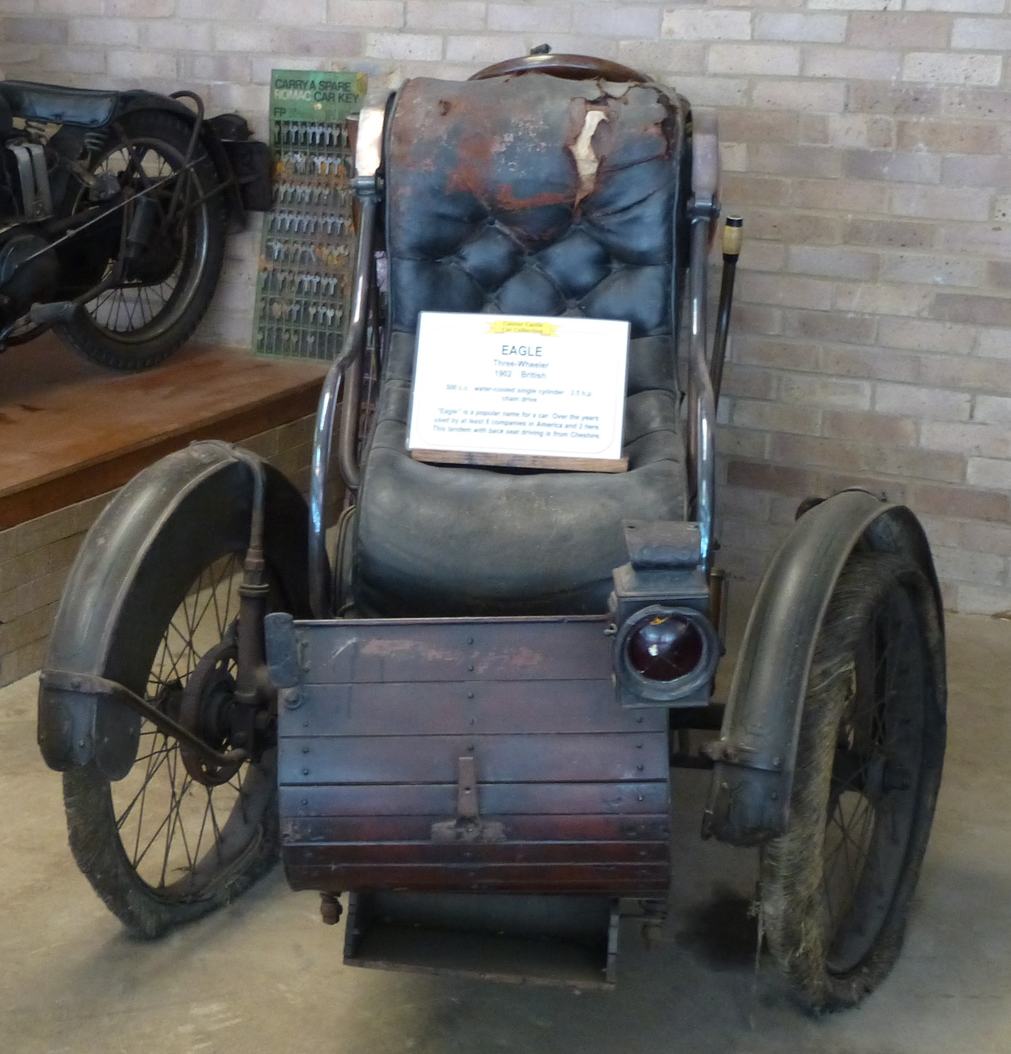 Eagle Tricar 1902